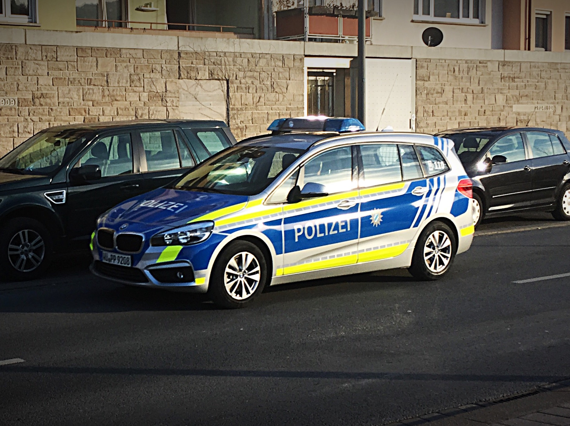 BMW 2er Gran Tourer auf Streife in Würzburg, Ende 2016 eingeführtes blaues Design